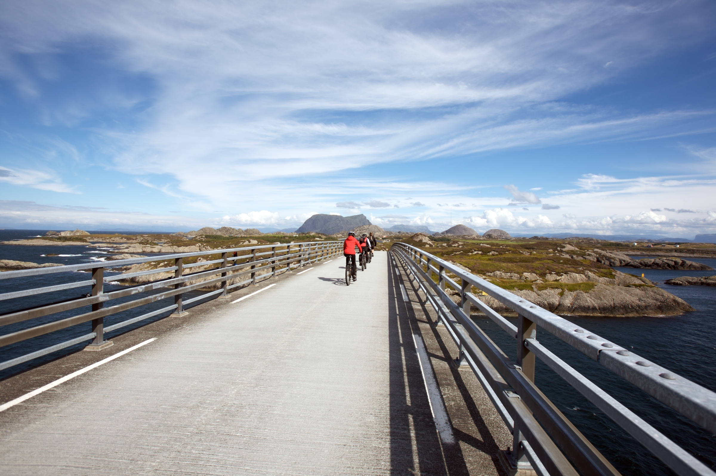 Askvoll, Sogn og Fjordane, Norway The road is Fylkesveg 365 i Sogn og Fjordane